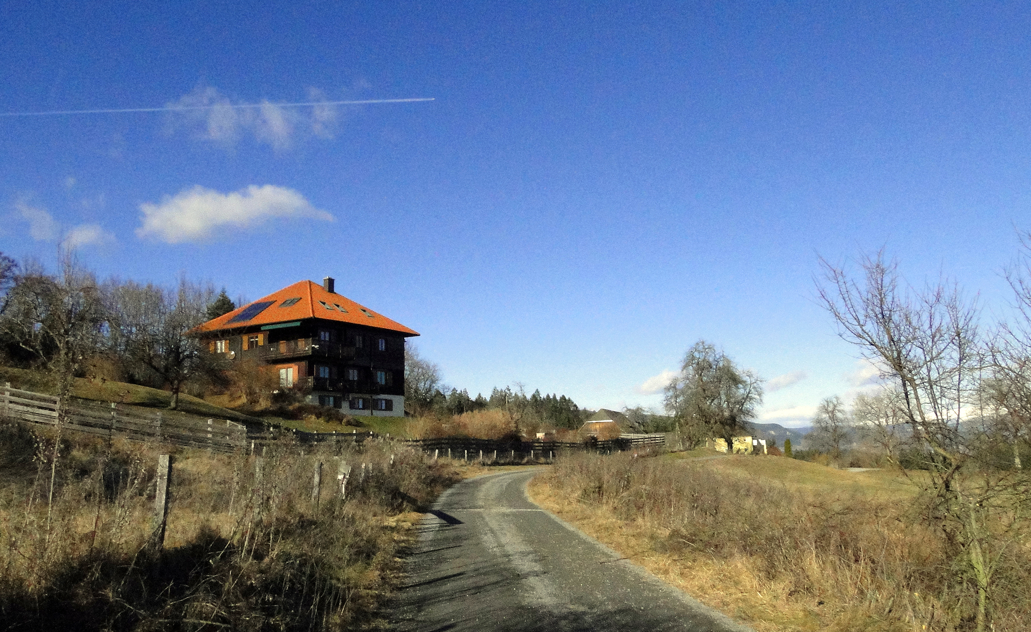 Galling ist eine Ortschaft mit 8 Einwohnern [1]in der Stadtgemeinde Sankt Veit an der Glan, Bezirk Sankt Veit an der Glan, Kärnten, Österreich